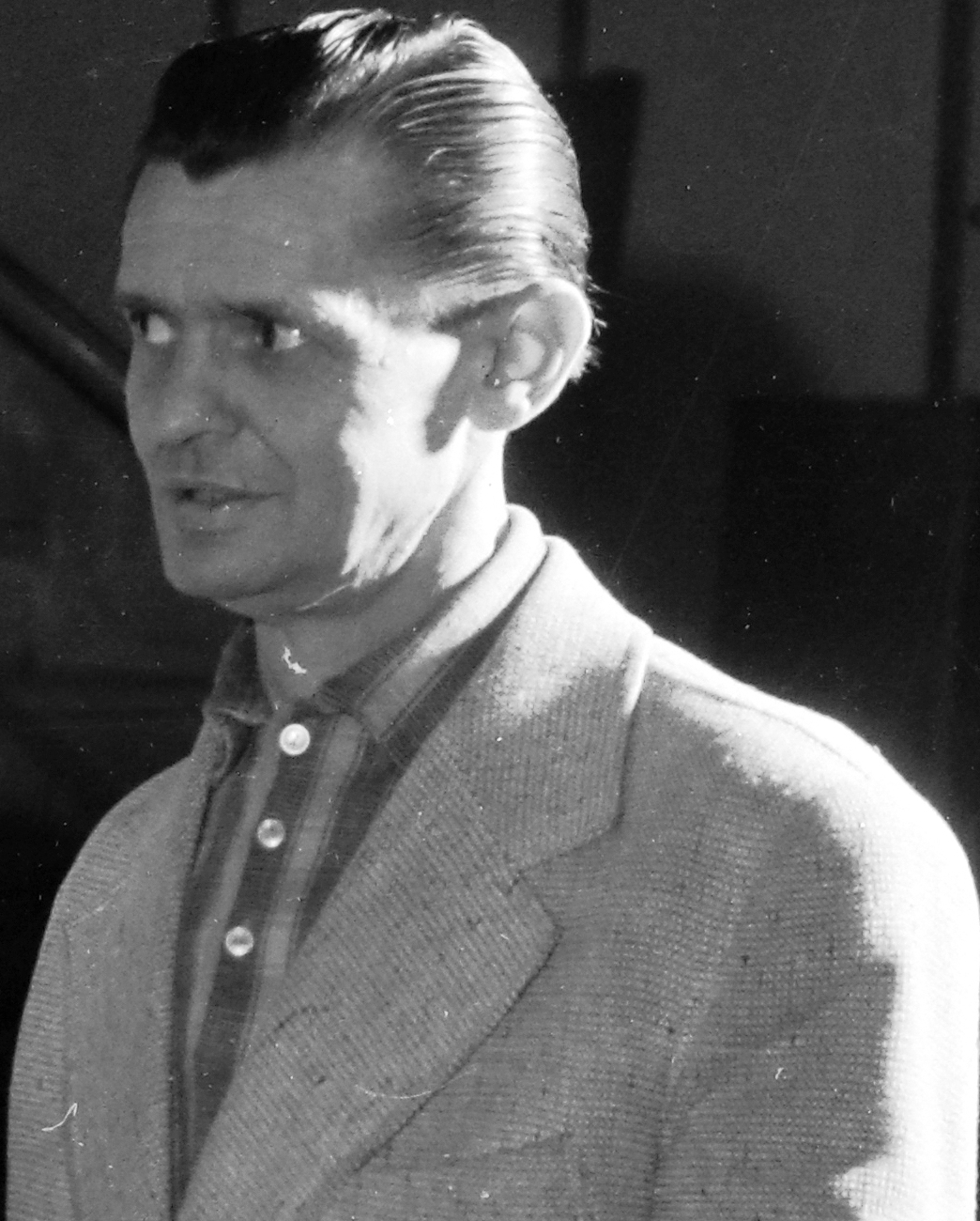 Görbe János magyar színész.